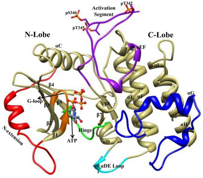 Estructura IRAK-4